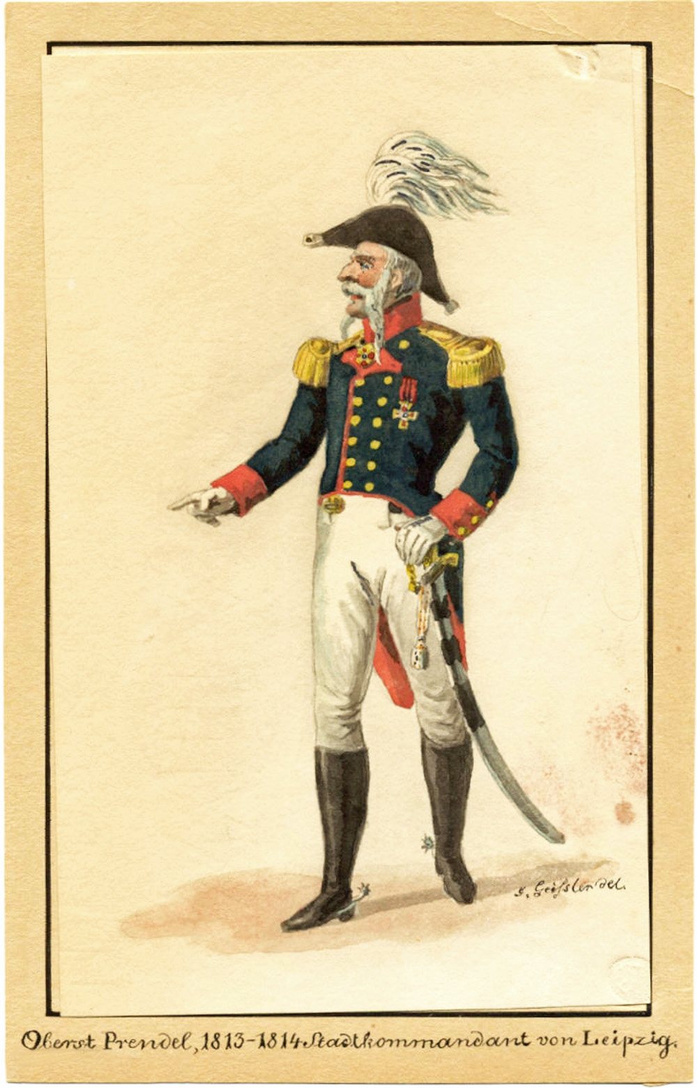 Victor von Prendel als Stadtkommandant von Leipzig